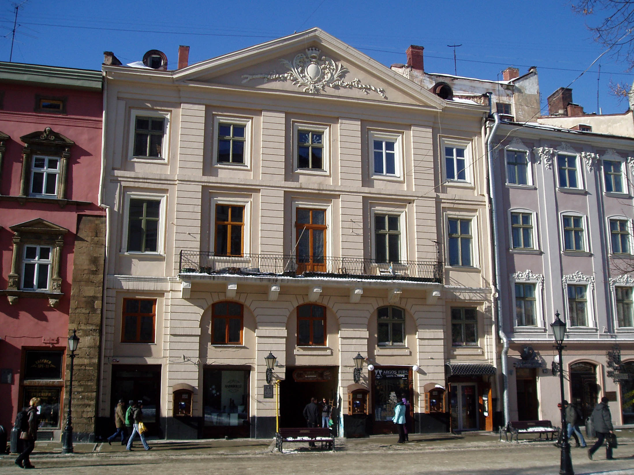 Кам'яниця Андреоллі (№ 29) на площі Ринок у Львові. Архітектор Христофор Мурадович, будував у 1765 році Франциск Кульчицький (?-1780)